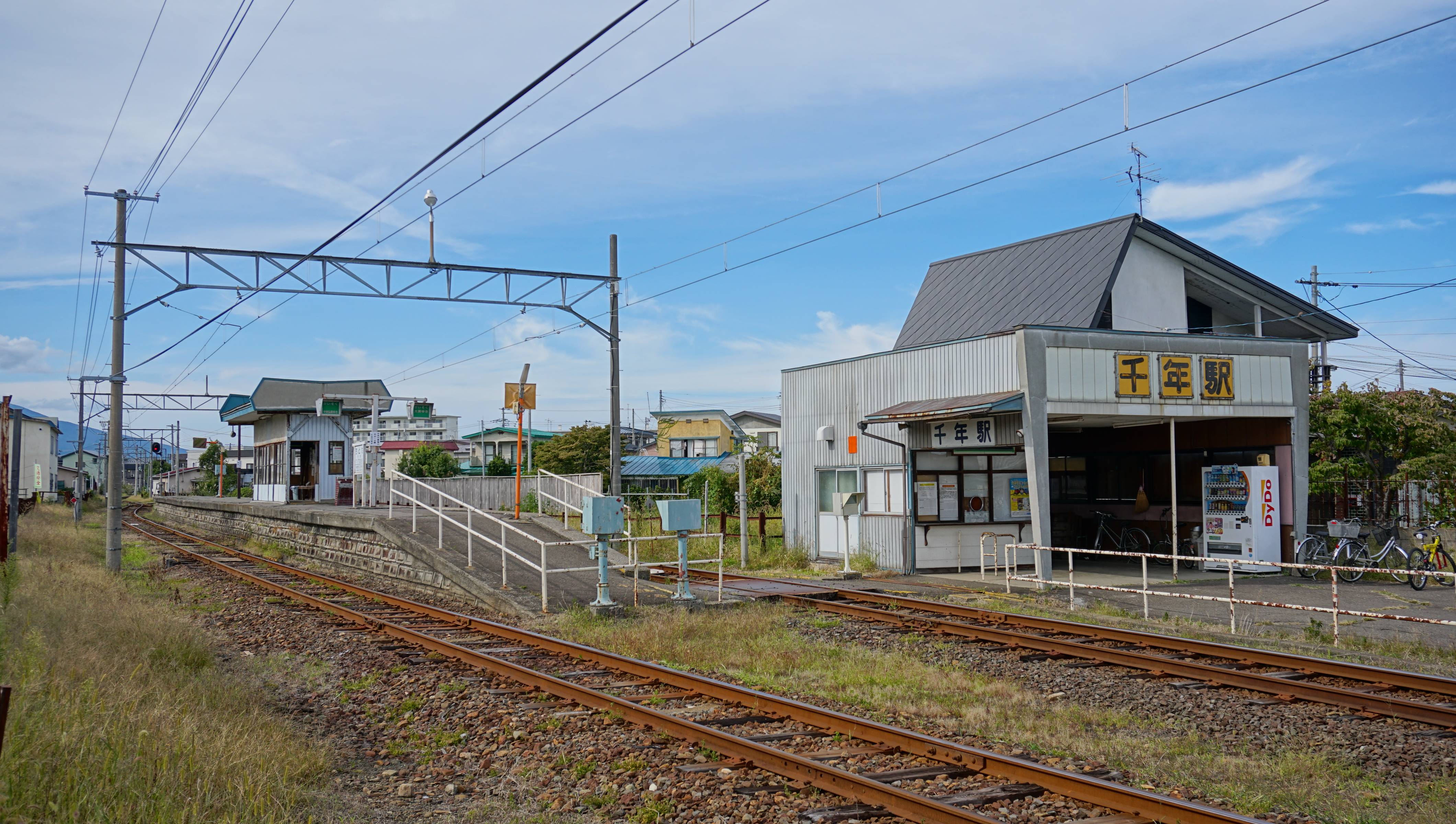 弘南鉄道大鰐線 千年駅。当駅のローマ字表記は「Chitose」ではなく「Titose」となっている。